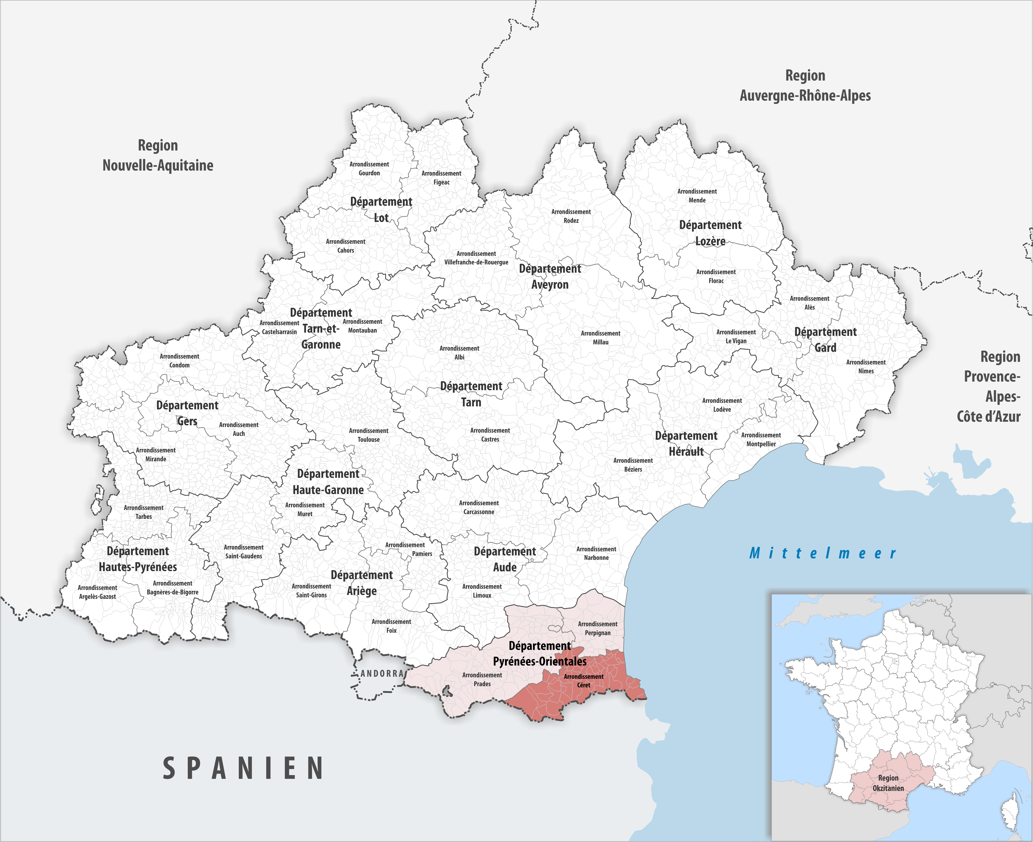 Lage des Arrondissements Céret